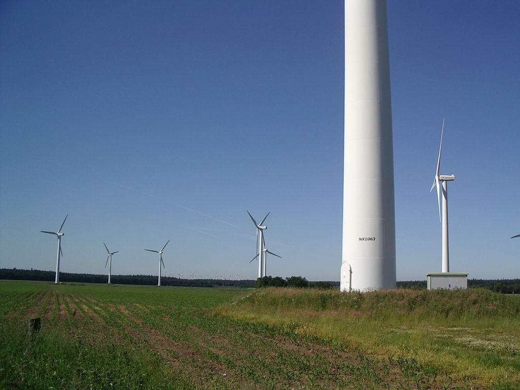 Windkraftanlagen auf der Hohen Lieth bei Krempel, Stadt Langen. Foto von Benutzer:Geoz 2005